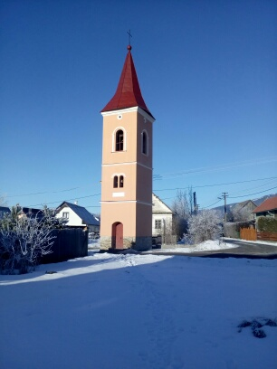 Evanjelická zvonica v obci Žiar